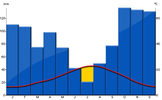 Diagramme ombrothermique de la ville de saint-Pons-de-Thomières